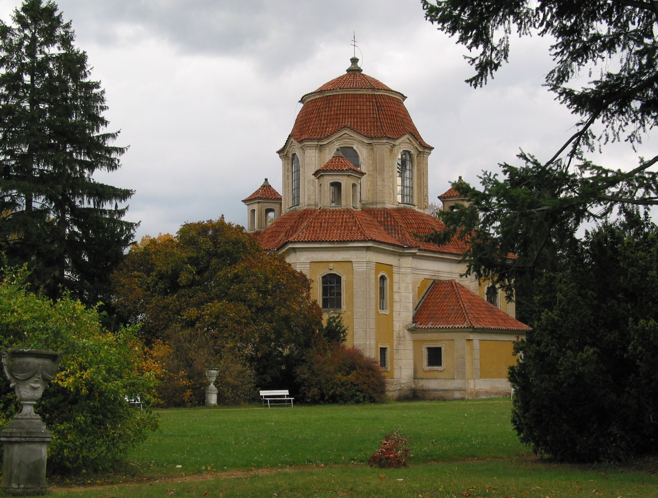 kaple sv. Anny v Panenských Břežanech